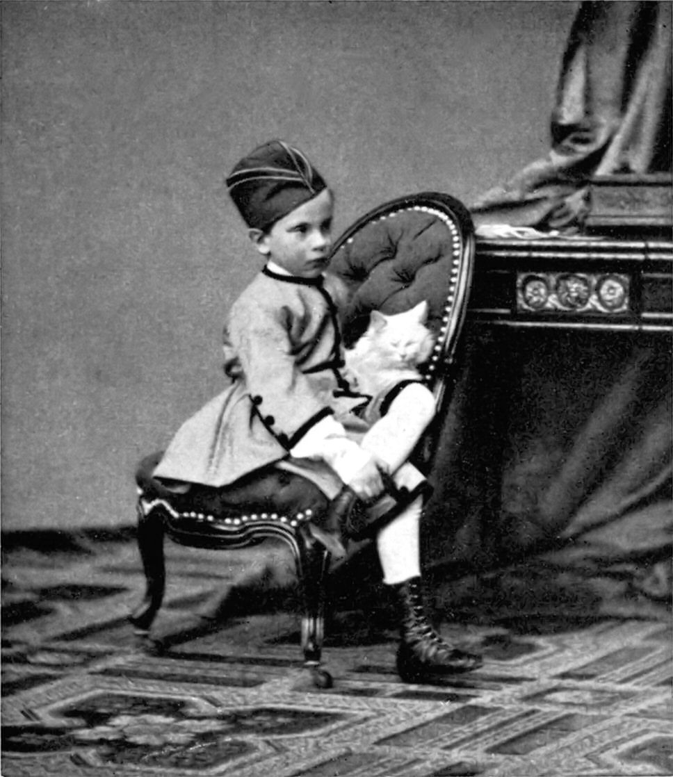 Rudolf von Österreich-Ungarn (1858-1889)